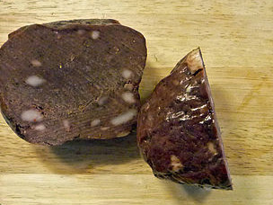 Möppkenbrot